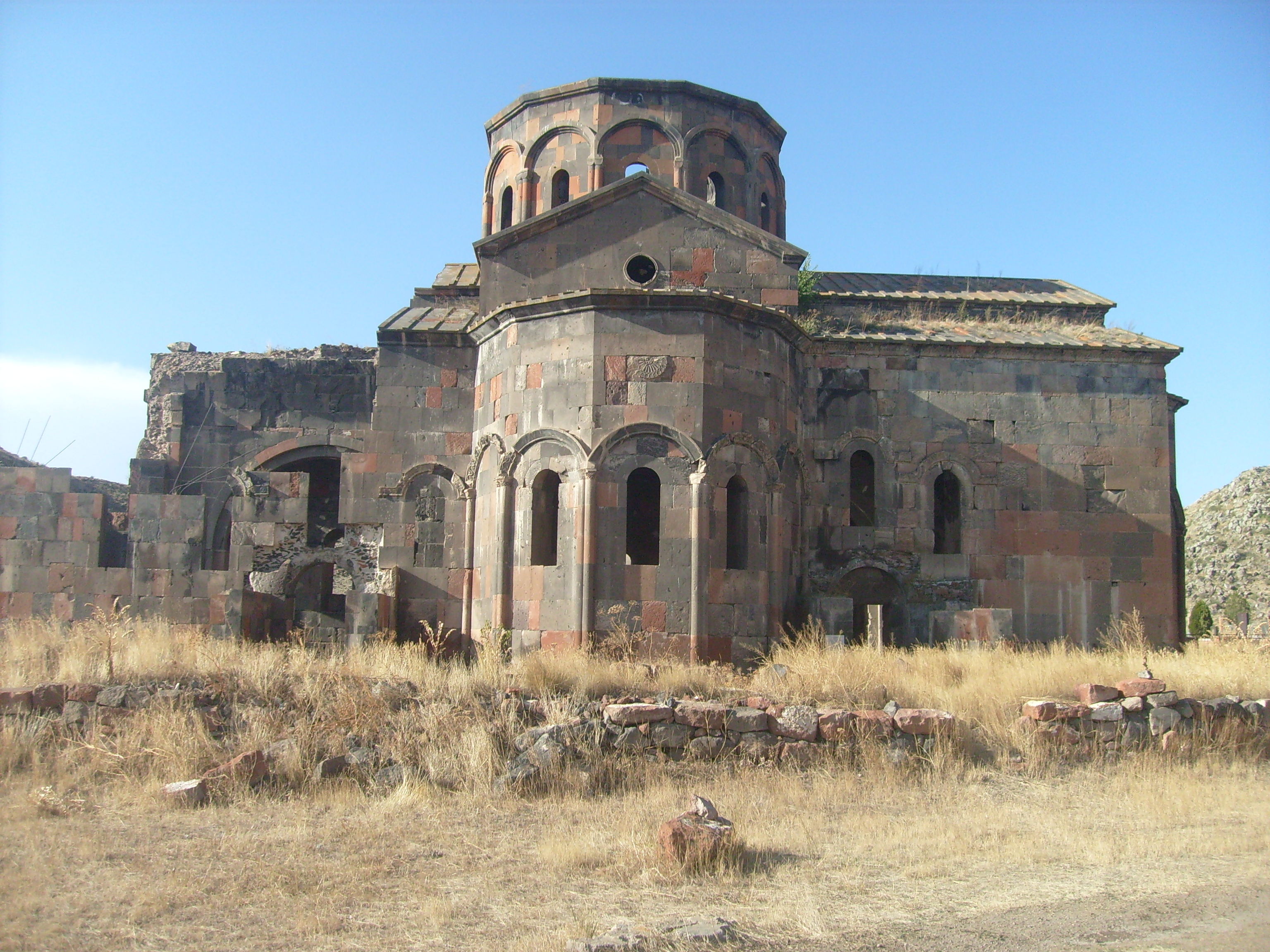 Եկեղեցական համալիր Թալին, Կաթողիկե, 4-20 դդ. 3/4